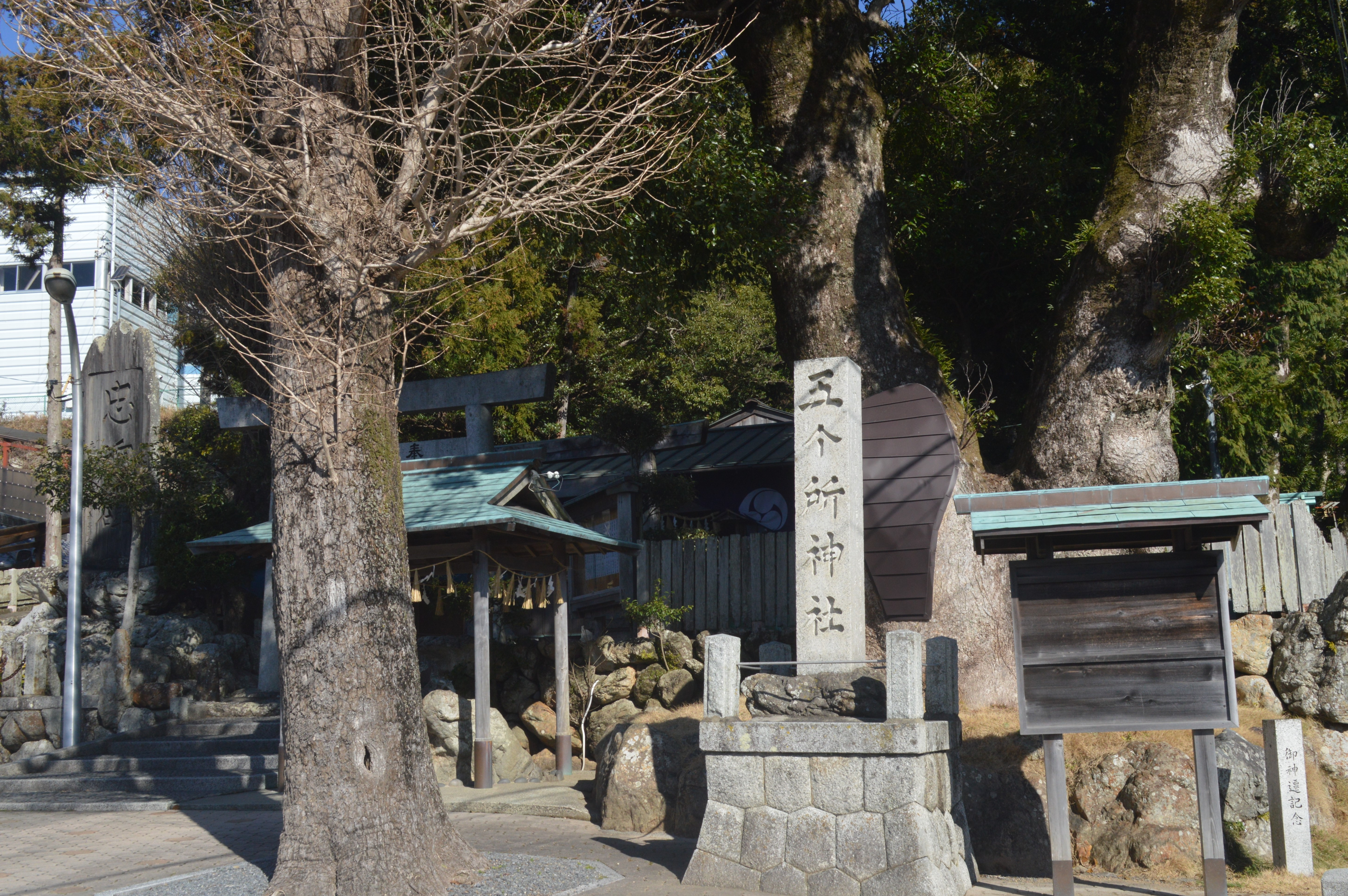 三重県度会郡南伊勢町五ヶ所浦にある五ヶ所神社。